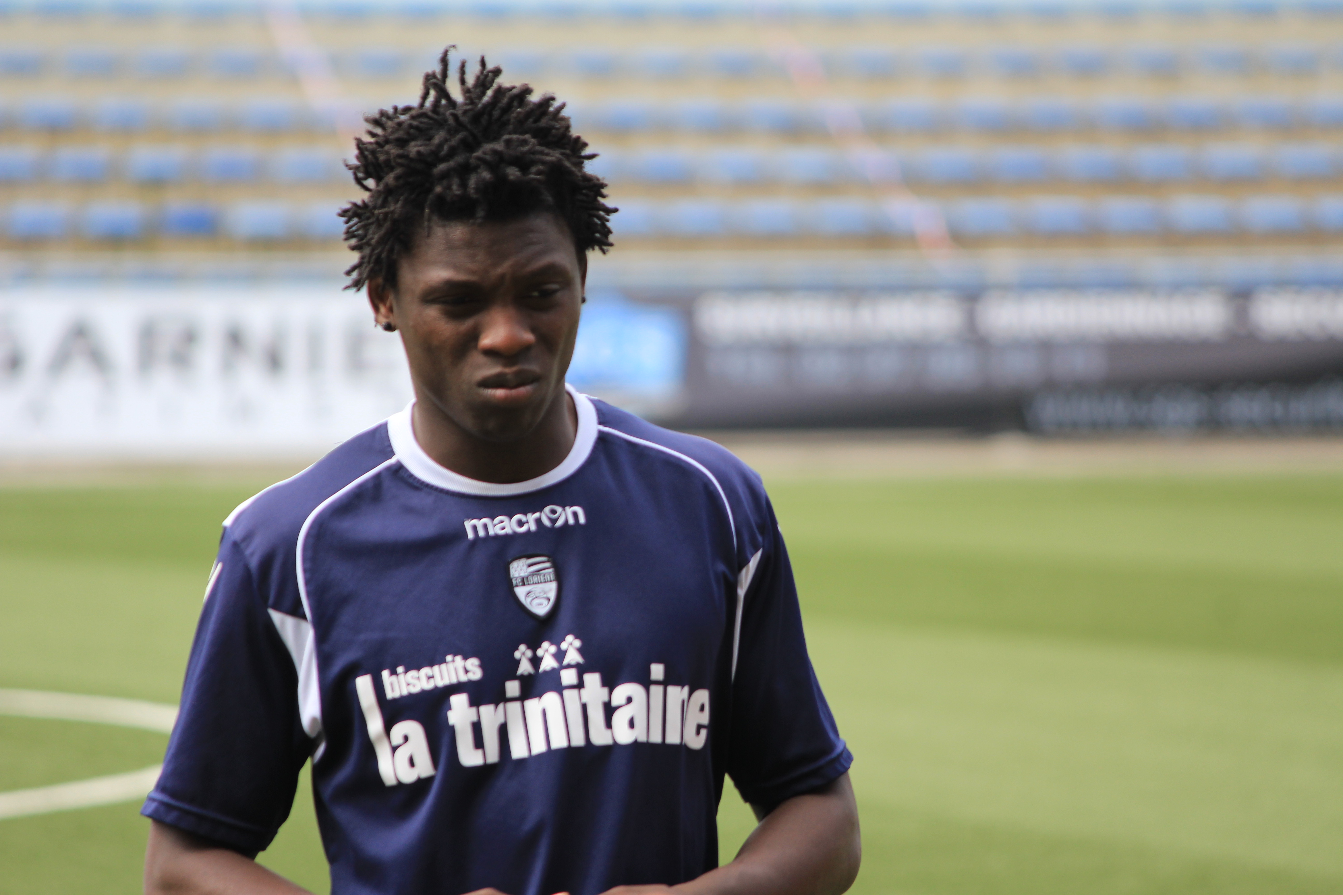 Lamine Gassama pendant un entrainement du FC Lorient le 24 mai 2013